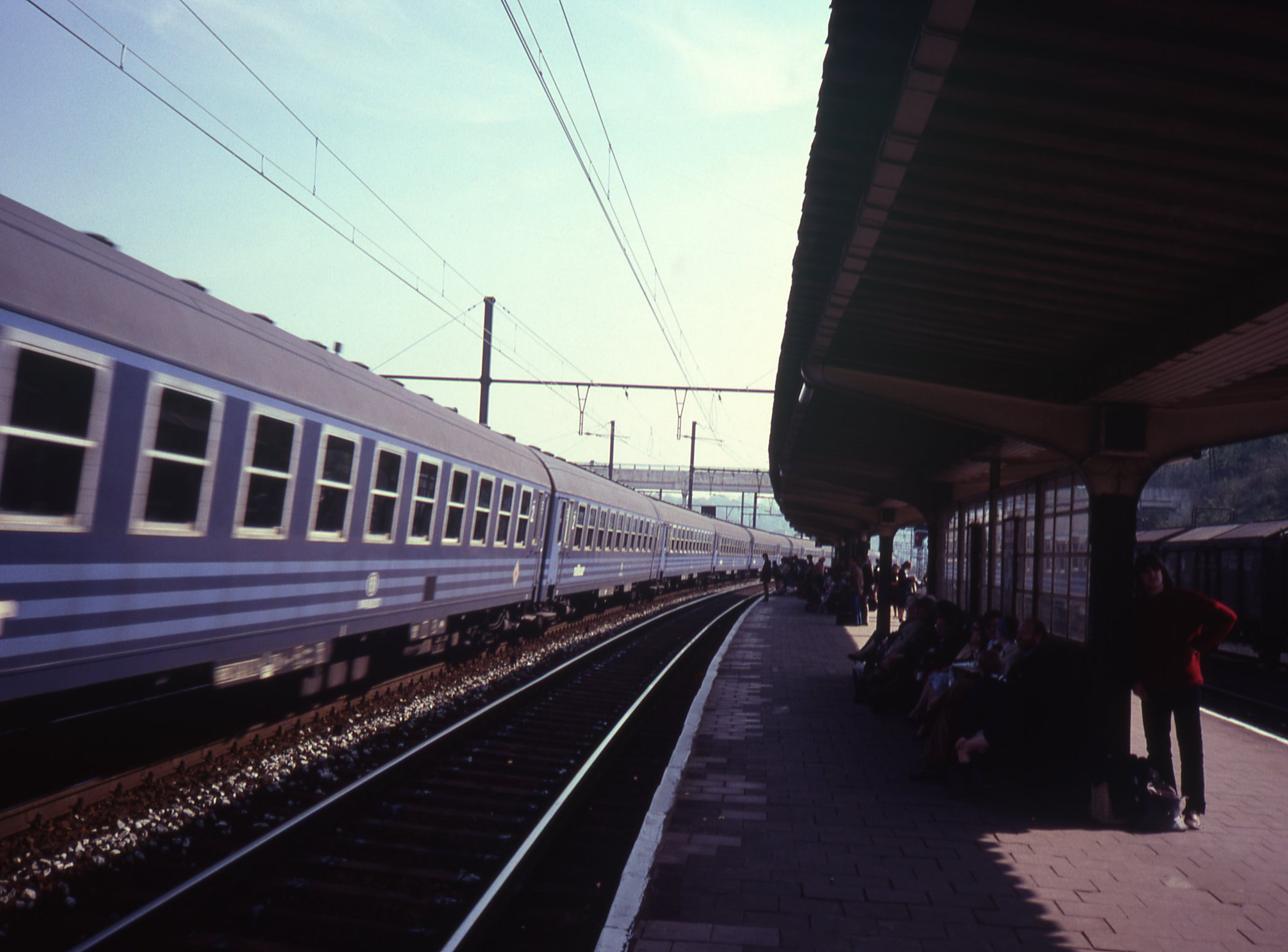 Een voorbijrijdende vakantietrein van Railtour in Ottignies. Vermoedelijk de trein 299, met ligrijtuigen van Oostende naar Chur/Brig/Milano.